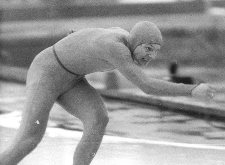 Andreas Dietel ADN-ZB Thieme 15.12.79 Karl-Marx-Stadt: DDR-Meisterschaften im Eisschnellauf- Sieger über 1500m wurde bei den Männern Andreas Dietel vom SC Dynamo Berlin.